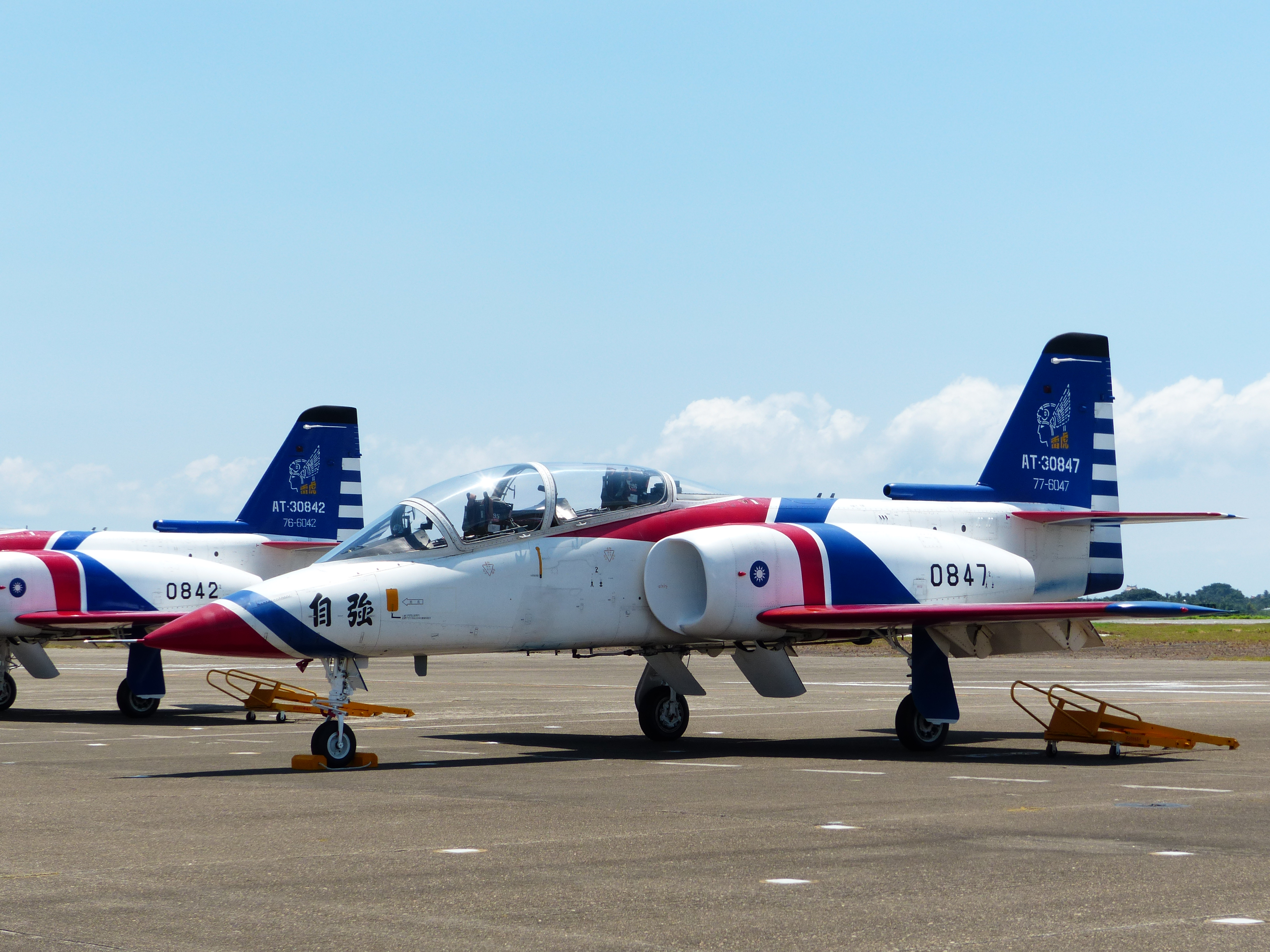 飛行表演結束後，停放空軍臺南基地停機坪的雷虎小組AT-3 0847。